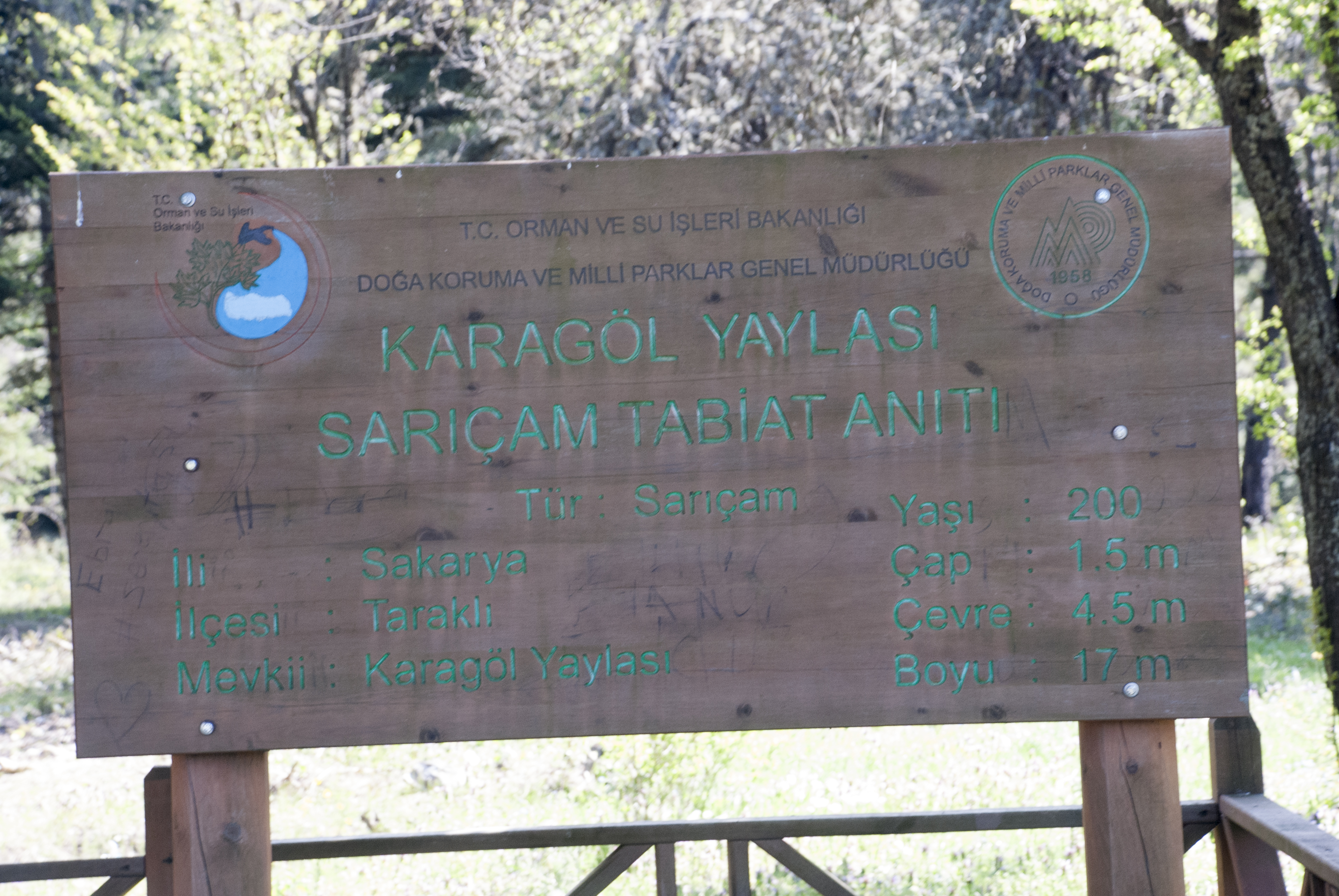 Karagö Yaylası Sarıçam tabiat anıtı, Sakarya, Taraklı